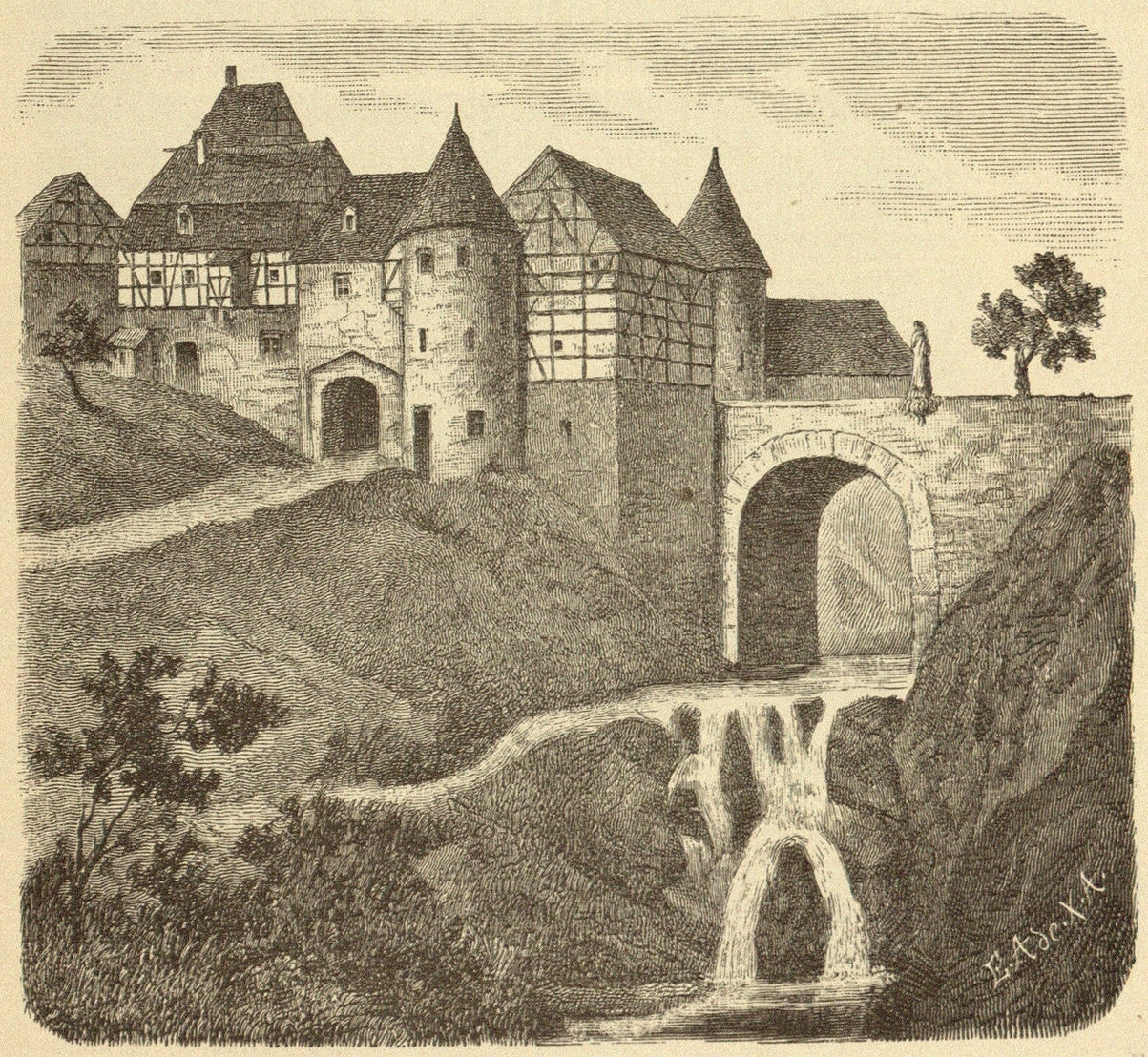 Schloss Blumenfeld, Ansicht Abbildung aus: Franz Xaver Kraus: Die Kunstdenkmäler des Grossherzogthums Baden. Band 1: Die Kunstdenkmäler des Kreises Konstanz. Freiburg i. Br. 1887